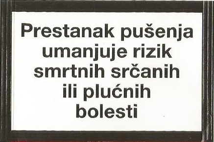 Natpis upozorenja na kutiji cigareta za hrvatsko tržište u 2015. godini